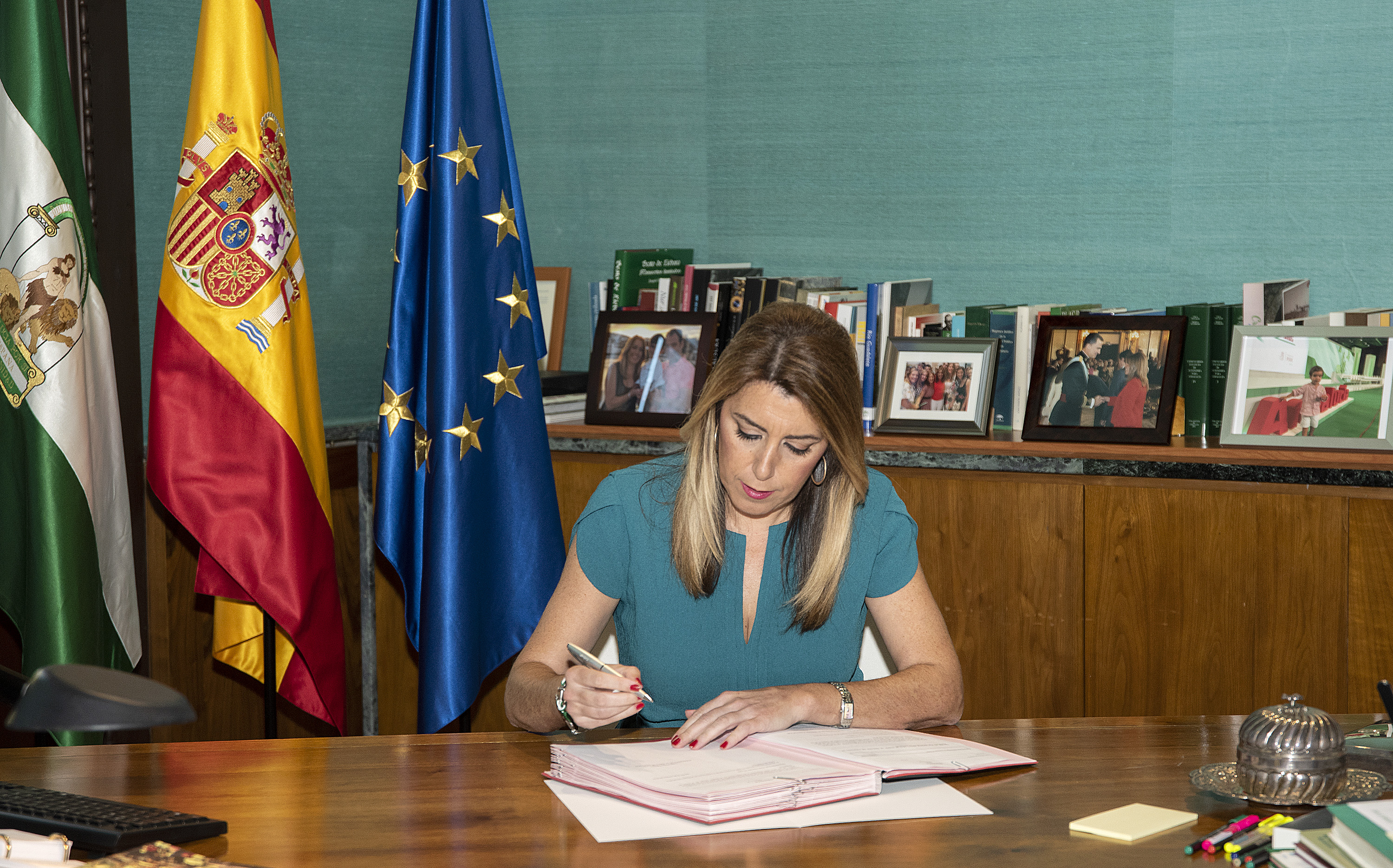 La presidenta de la Junta, Susana Díaz,firma el decreto de disolución del parlamento y convocatoría de elecciones en Andalucía/08/10/2018- Foto: OPJA(GC). Fotografía oficial de la Junta de Andalucía, se pone a disposición solamente para su publicación por las organizaciones de noticias y/o para la impresión de uso personal por parte del sujeto (s) de la fotografía. La fotografía no puede ser manipulada de ninguna manera y no se puede utilizar en materiales comerciales o políticos, los anuncios, productos, promociones que de alguna manera sugieran aprobaciçón o respaldo de la Junta de Andalucía.